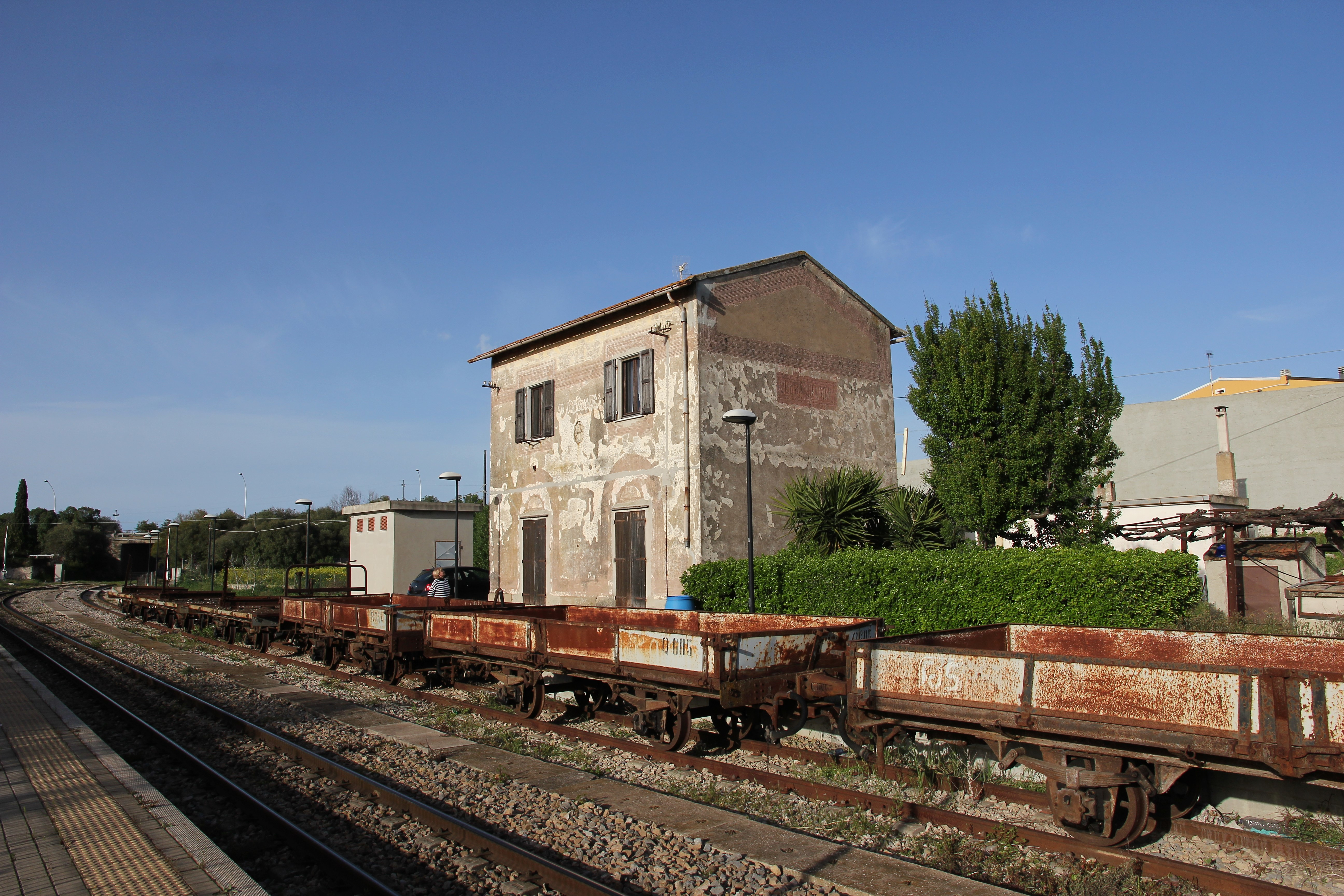 Sassari, stazione ferroviaria di Rodda Quadda